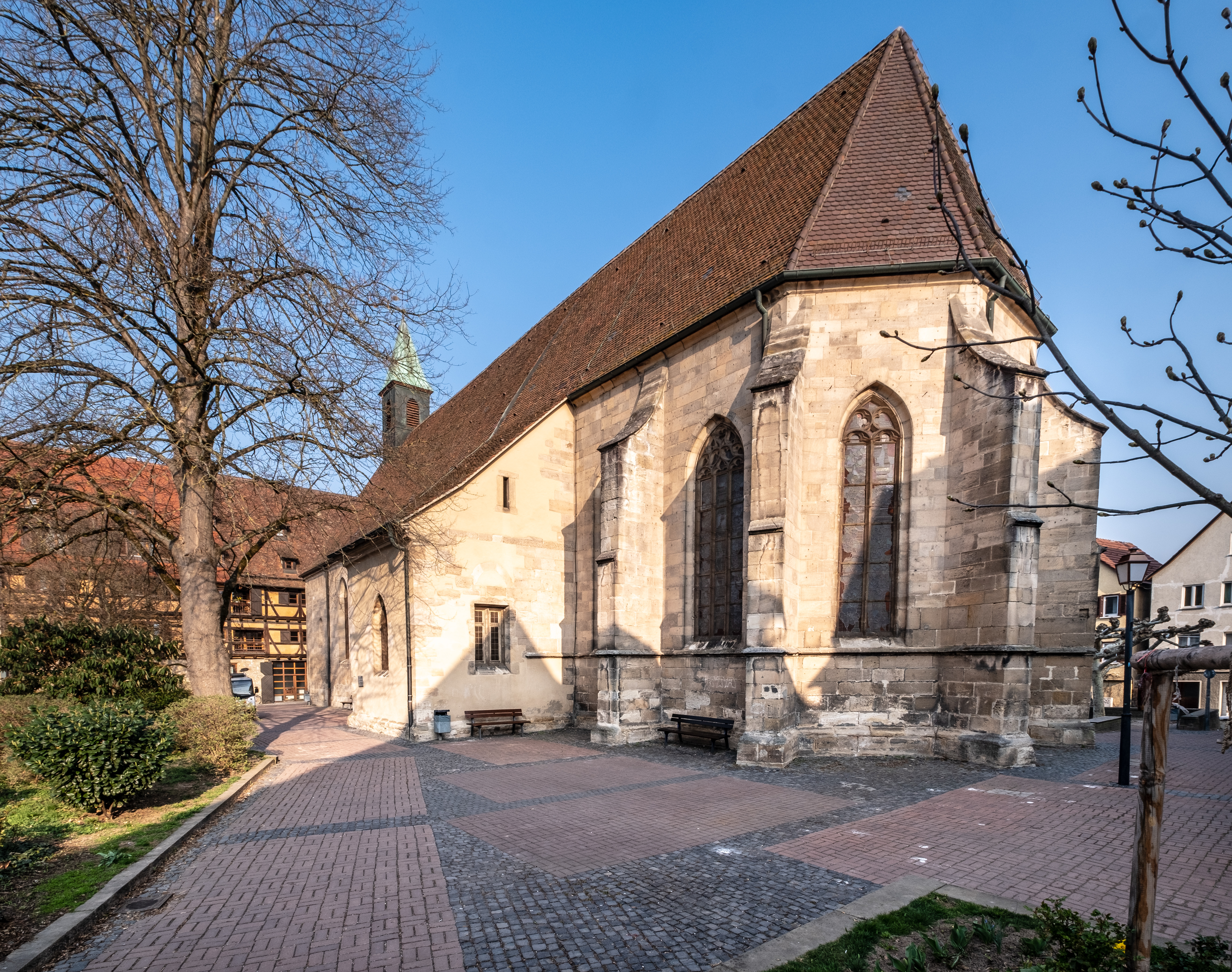 Jakobuskirche Tübingen Ansicht von Osten